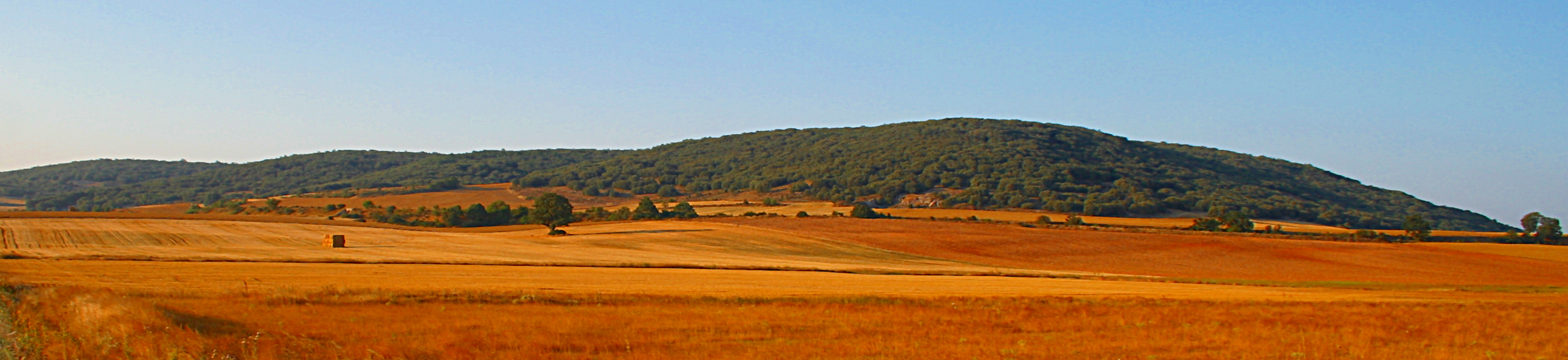 Panorámica de la Sierra de Atapuerca